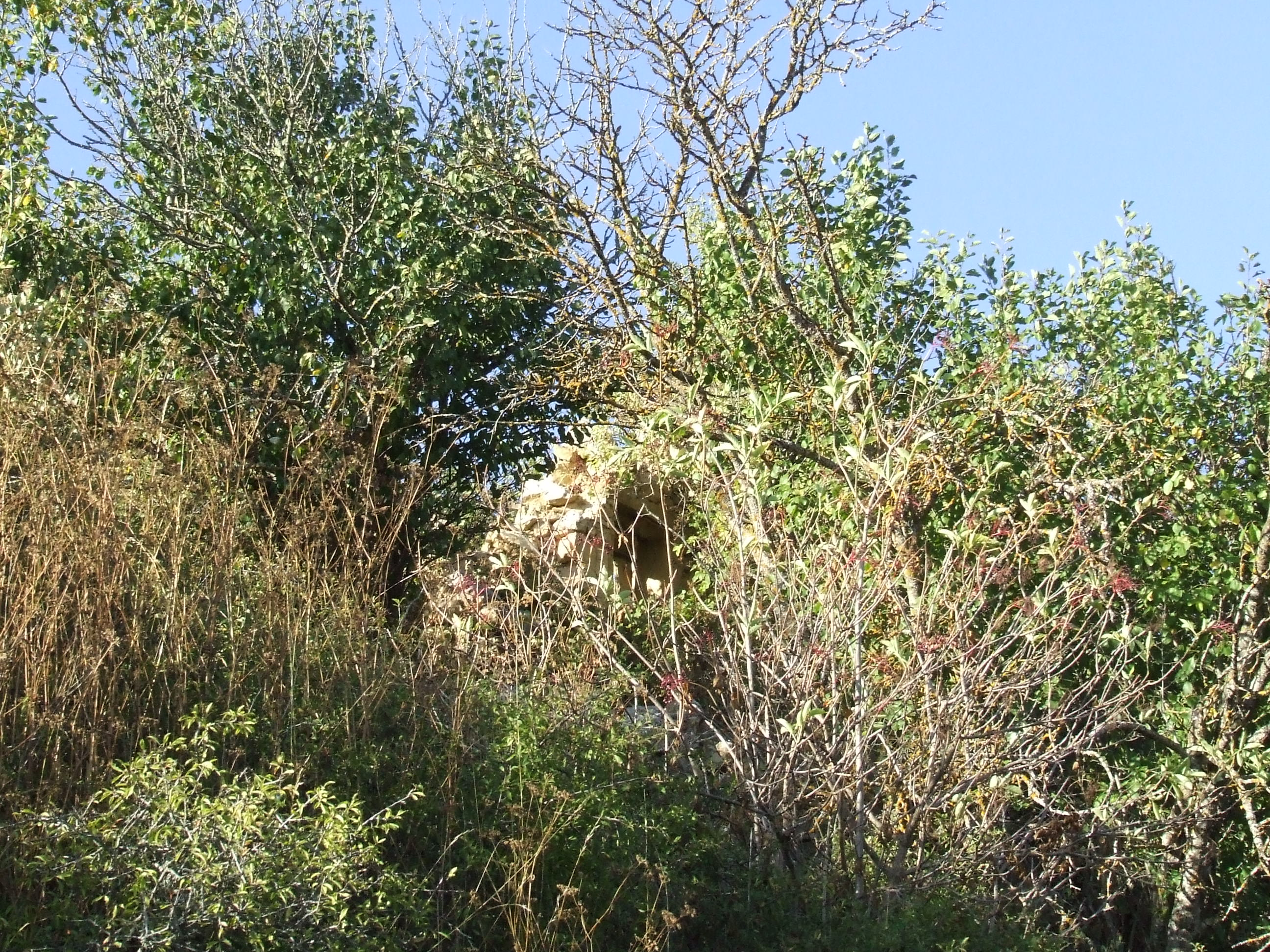 Cal Valldoriola (Bóixols, Abella de la Conca, Pallars Jussà)